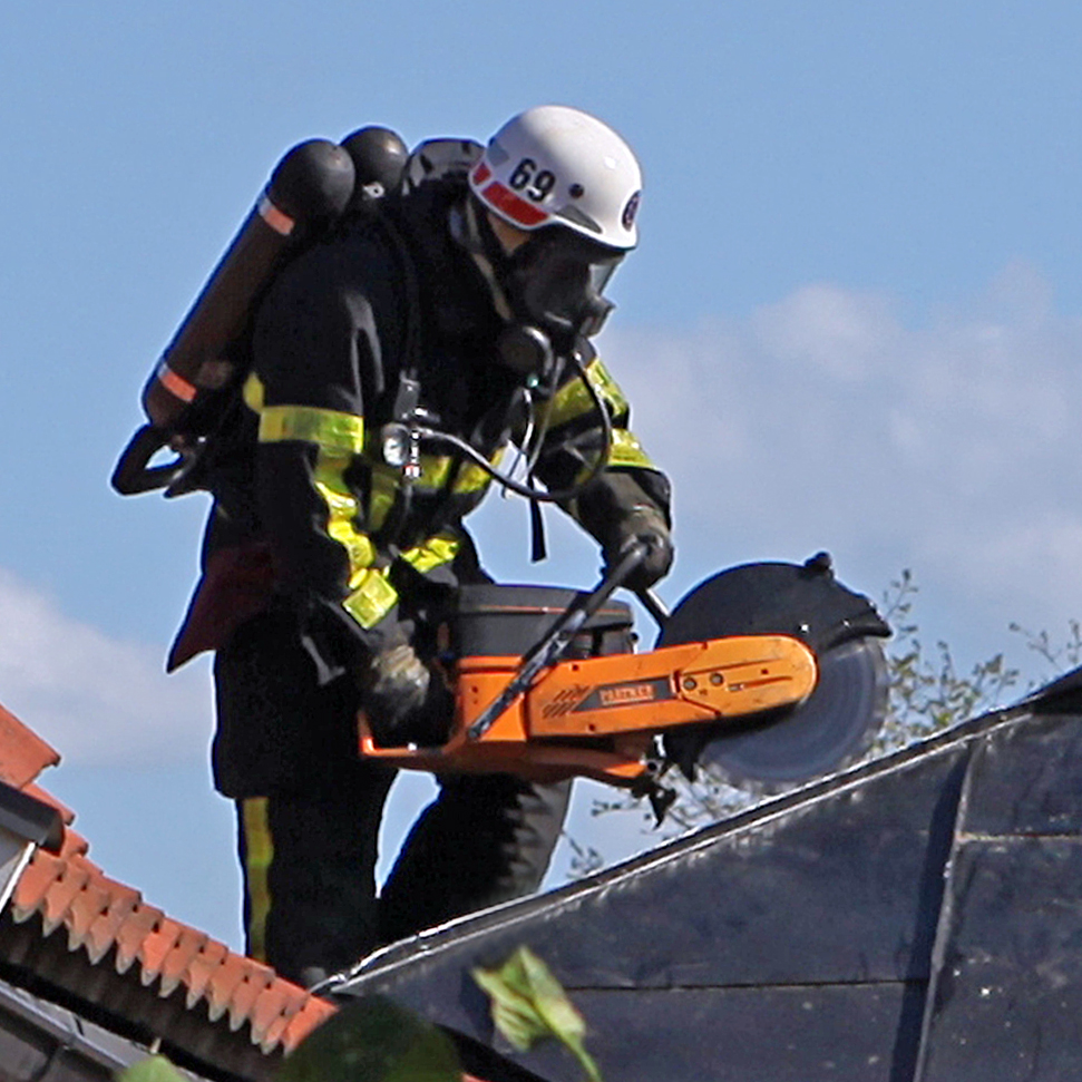 Brandman på taket av en hus brand. Det är inte alltid lätt att komma åt branden